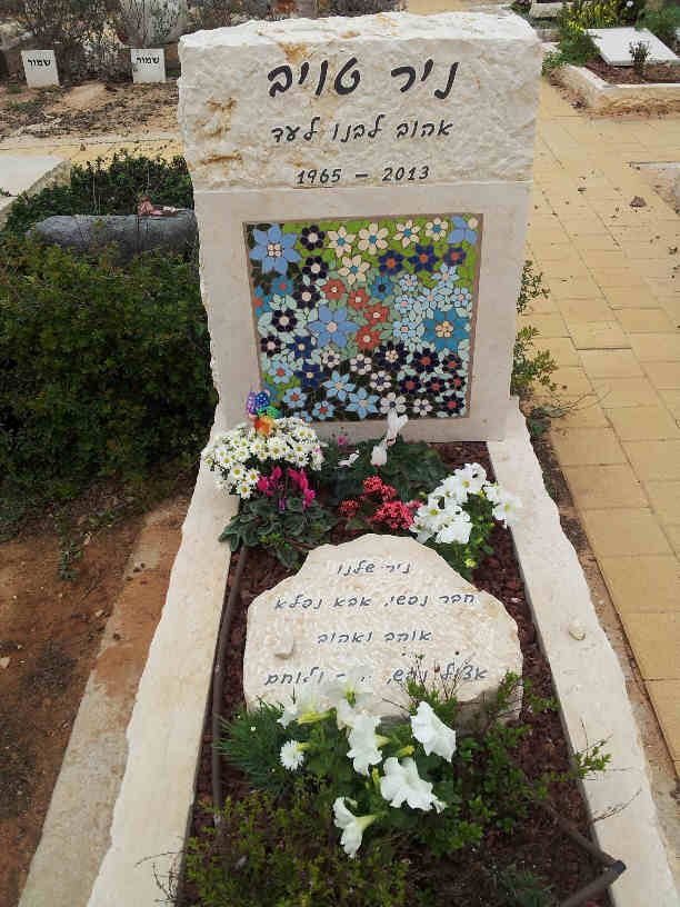 המצבה על קברו של ניר טויב